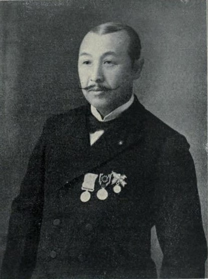 織田利三郎（1857～1923）静岡県浜松田町で人形や玩具を売る雑貨店「霞屋」を営んでいたが、「ヘチマ・トウガラシ・落花生・ショウガ同業組合」を設立して生産向上に尽力し、一坪農業を奨励するなど、浜松の産業経済の発展に貢献した。短気な性格から生涯に4度結婚した。霞屋は、1904年のシカゴ万博のため渡米した際に洋風家具やカーテンなどを買い入れ、装飾家具商に転向。浜松田町（現・ゆりの木通り）には現在も子孫が経営するインテリアの店「カスミヤ」がある。